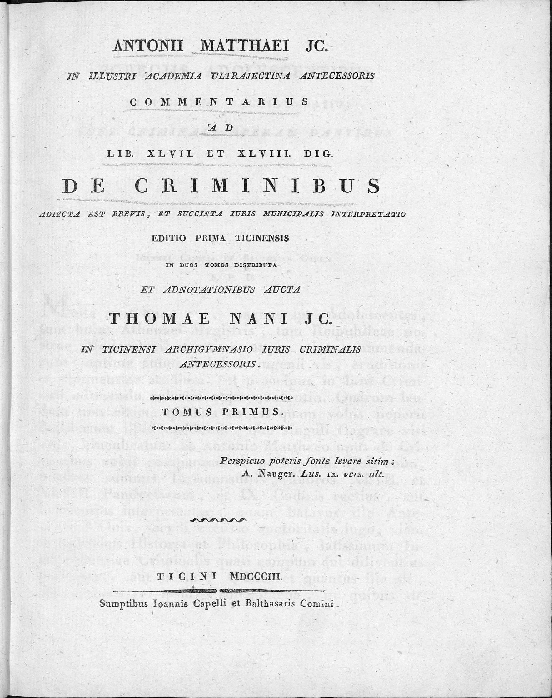 Frontespizio